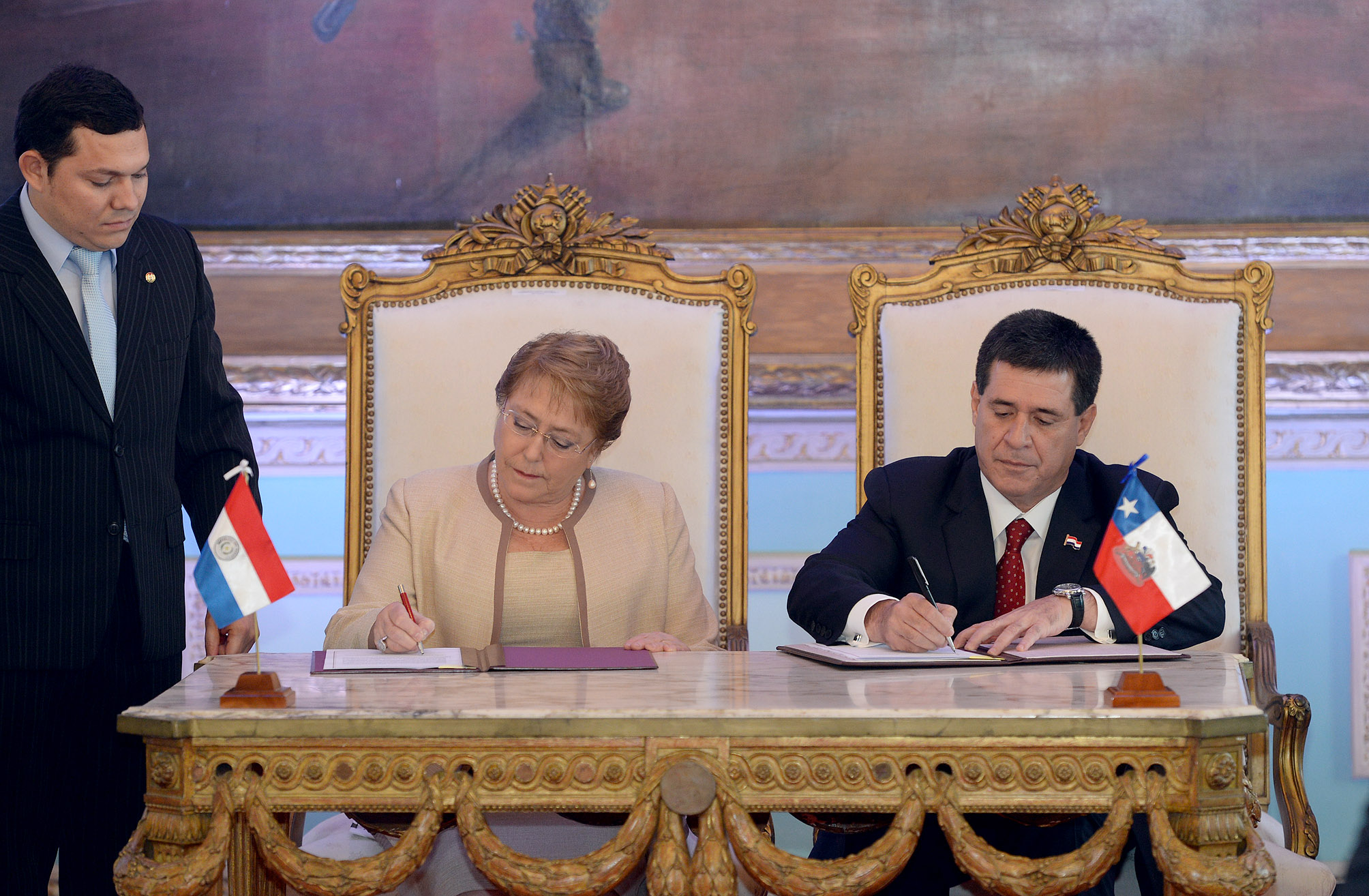 Gobierno de Chile